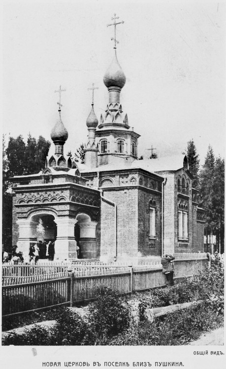 Церковь Сошествия Святого Духа (1906-12). Архитектор К. К. Гиппиус.